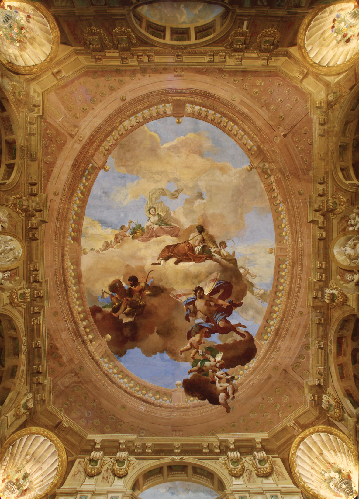 L'ampio salone centrale della Villa Mosconi Bertani del 1735 che occupa due piani e presenta degli affreschi degli autori bolognesi Pesci e Valliani.